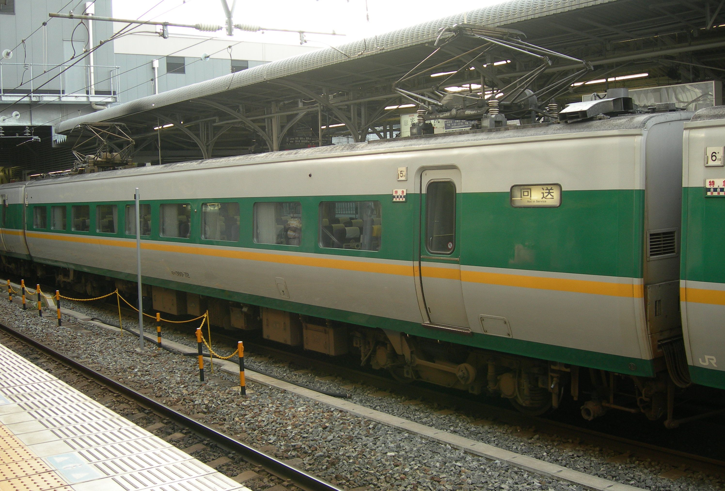 JR西日本381系電車